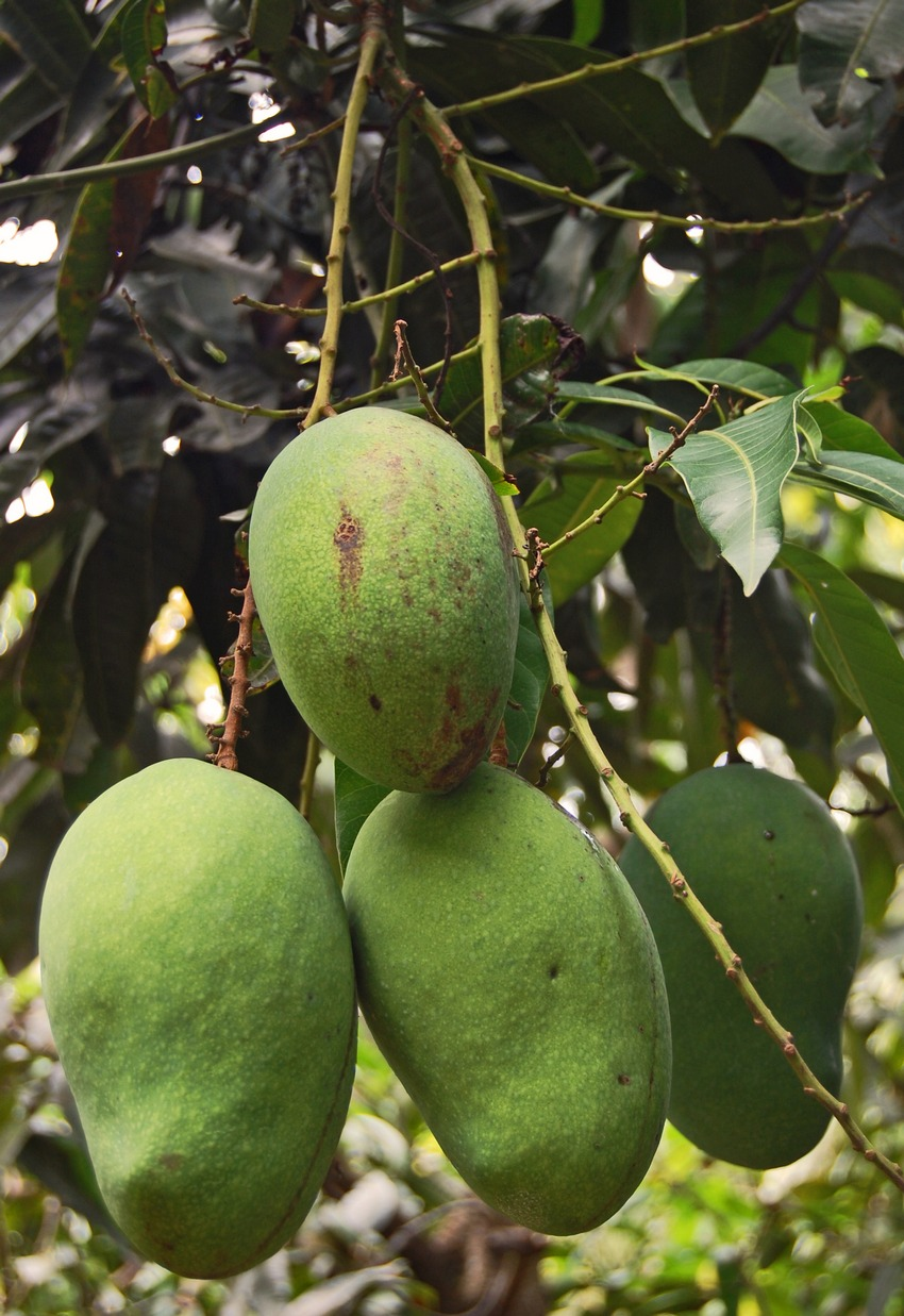 Mangga arumanis, a sort of mango, Mangifera indica. From Jabranti, Kuningan, West Java, Indonesia.